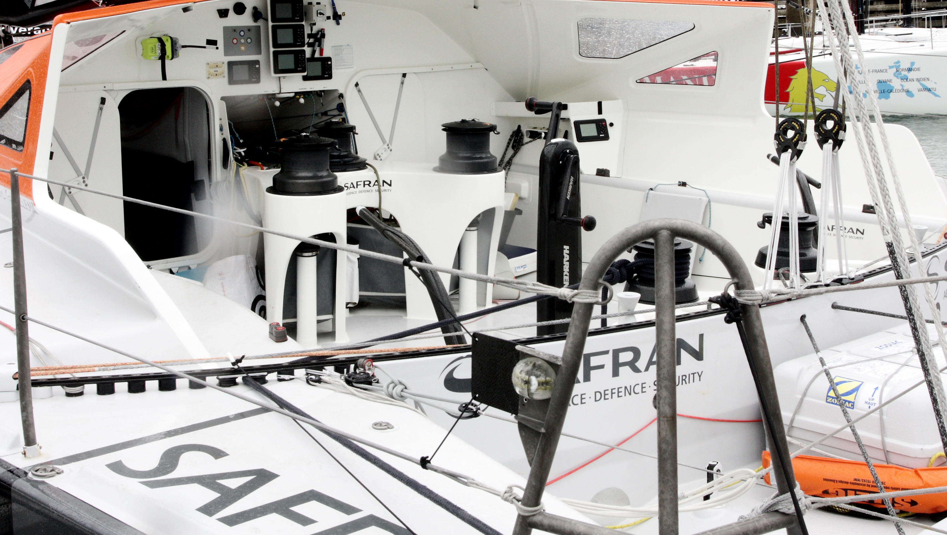 La Trinité-sur-mer